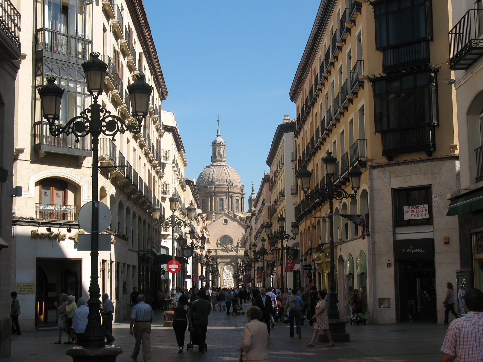 Пешеходная улица Сарагосы